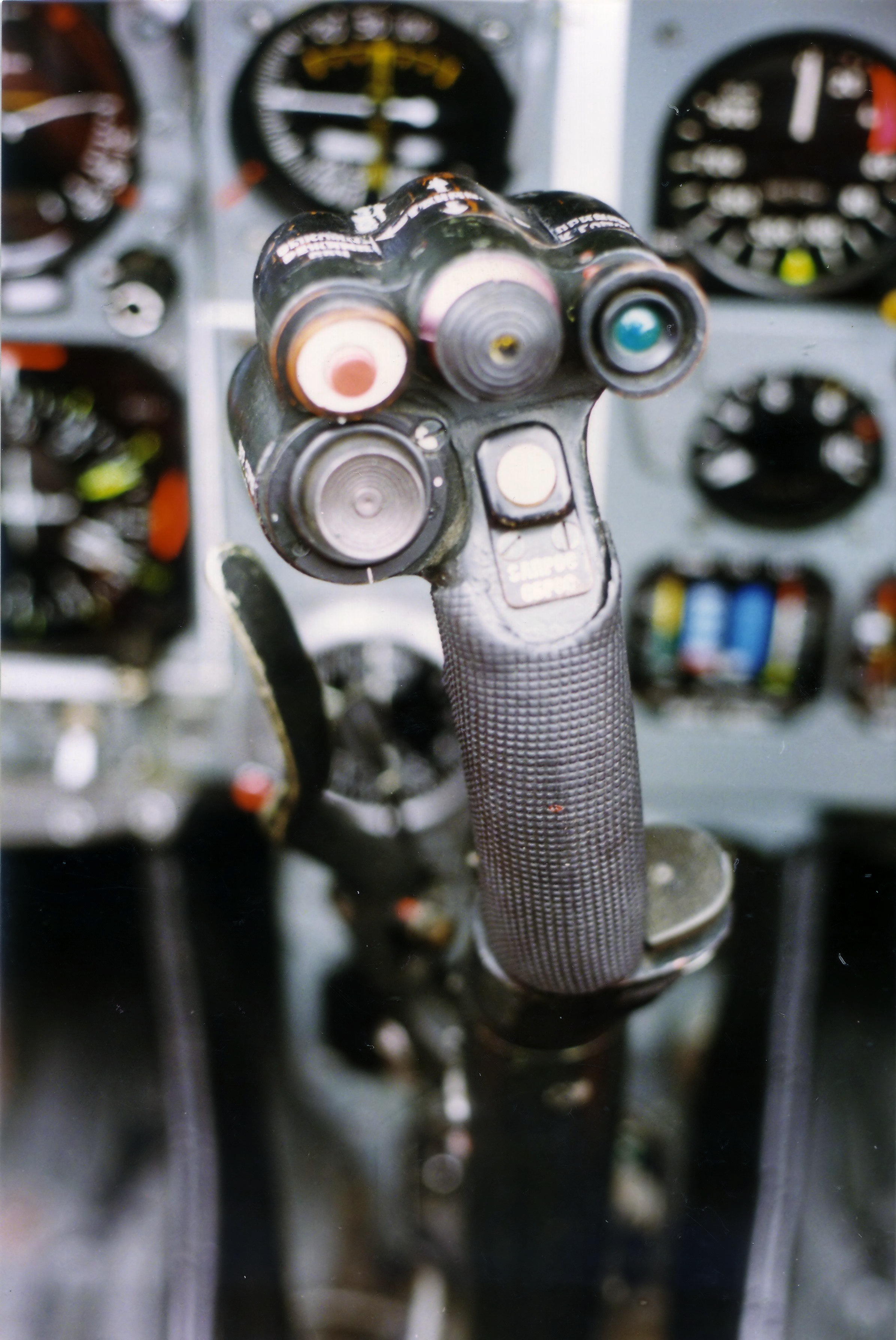 MiG-29 cockpit